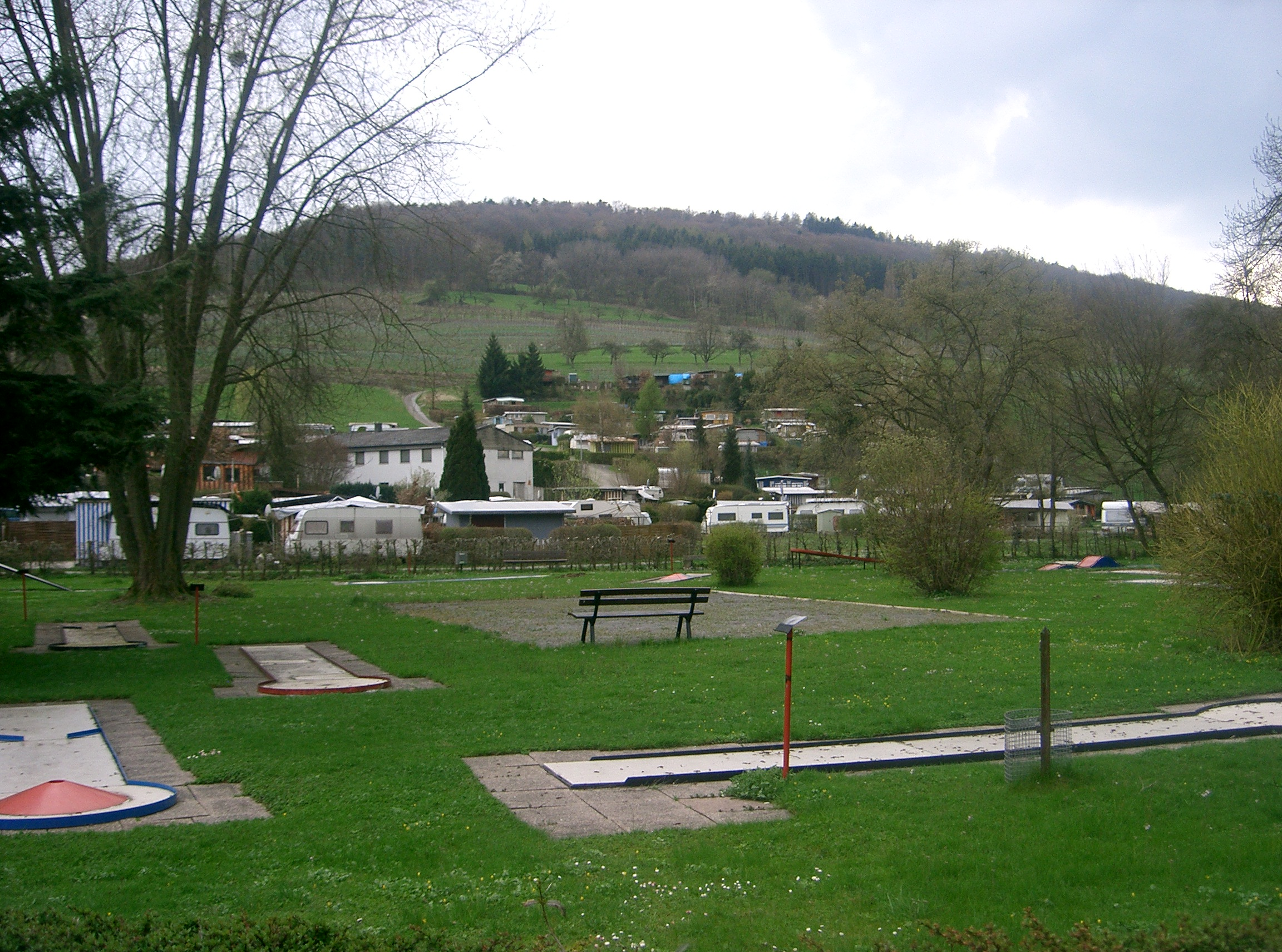 Der Campingplatz in Pfedelbach-Untersteinbach mit Minigolf und Beach Volleyball